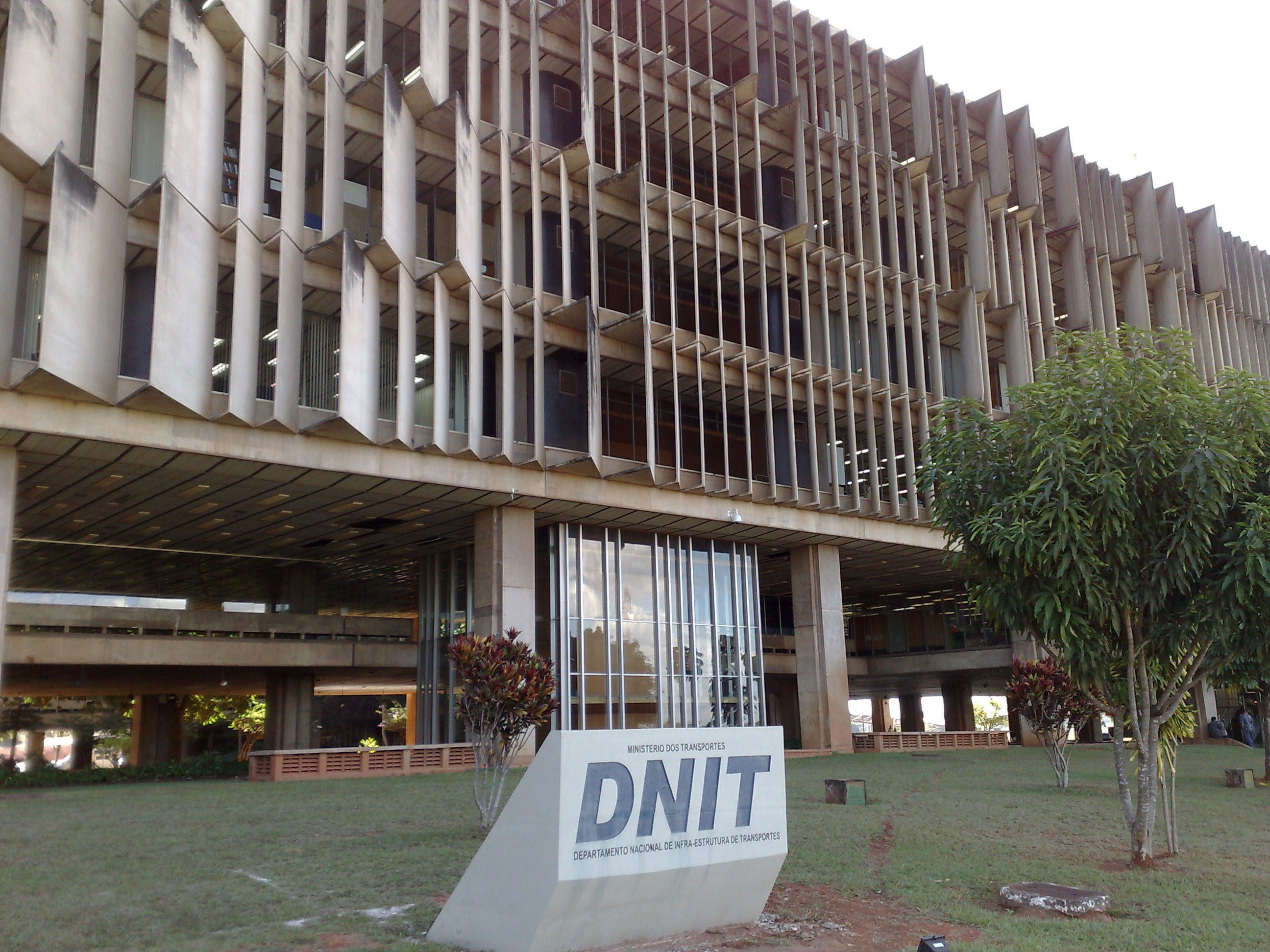 Edifício sede do DNIT - Departamento Nacional de Infraestrutura de Transportes, Brasília.